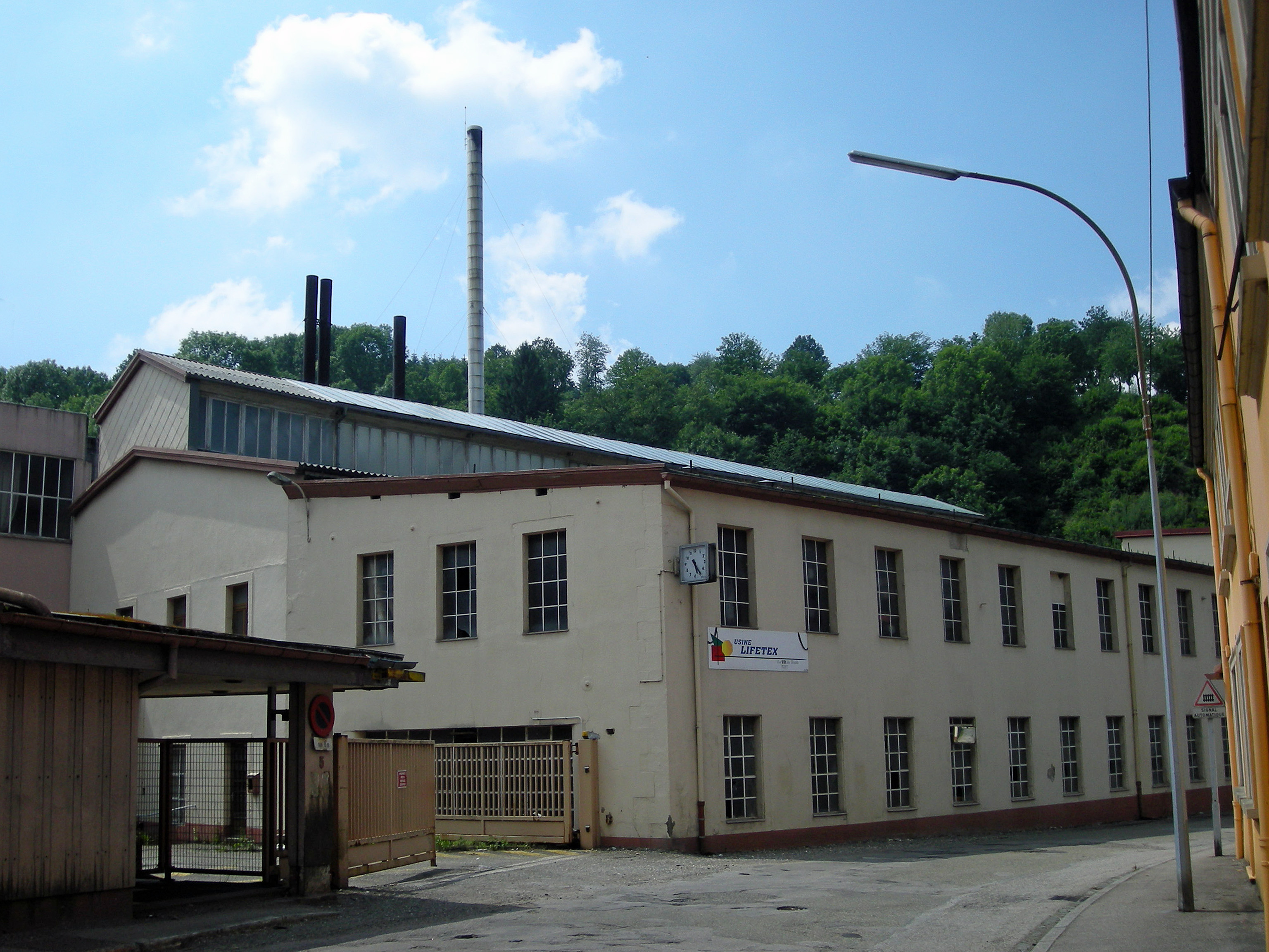 Rothau : usine Lifetex (anciennement Steinheil) en 2008. Aujourd'hui démolie.